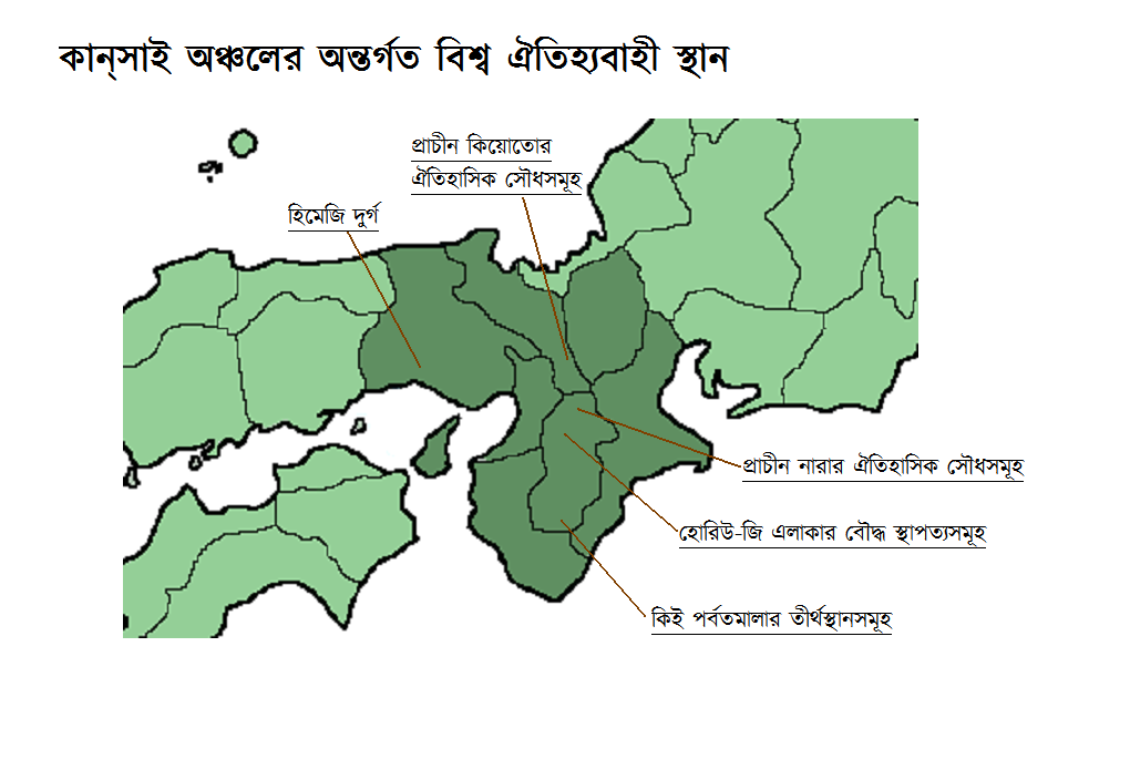 জাপানের কান্‌সাই অঞ্চলে (গাঢ় সবুজ রঙে চিহ্নিত) বিভিন্ন বিশ্ব ঐতিহ্যবাহী স্থানের অবস্থান